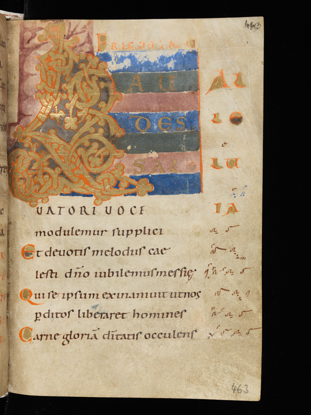 Cod. Eins. 121, Beginn der Sequenz "Laudes salvatori voce", S. 463